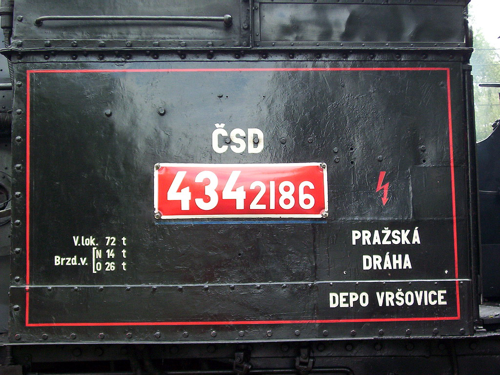 Lokomotiva 434.2186